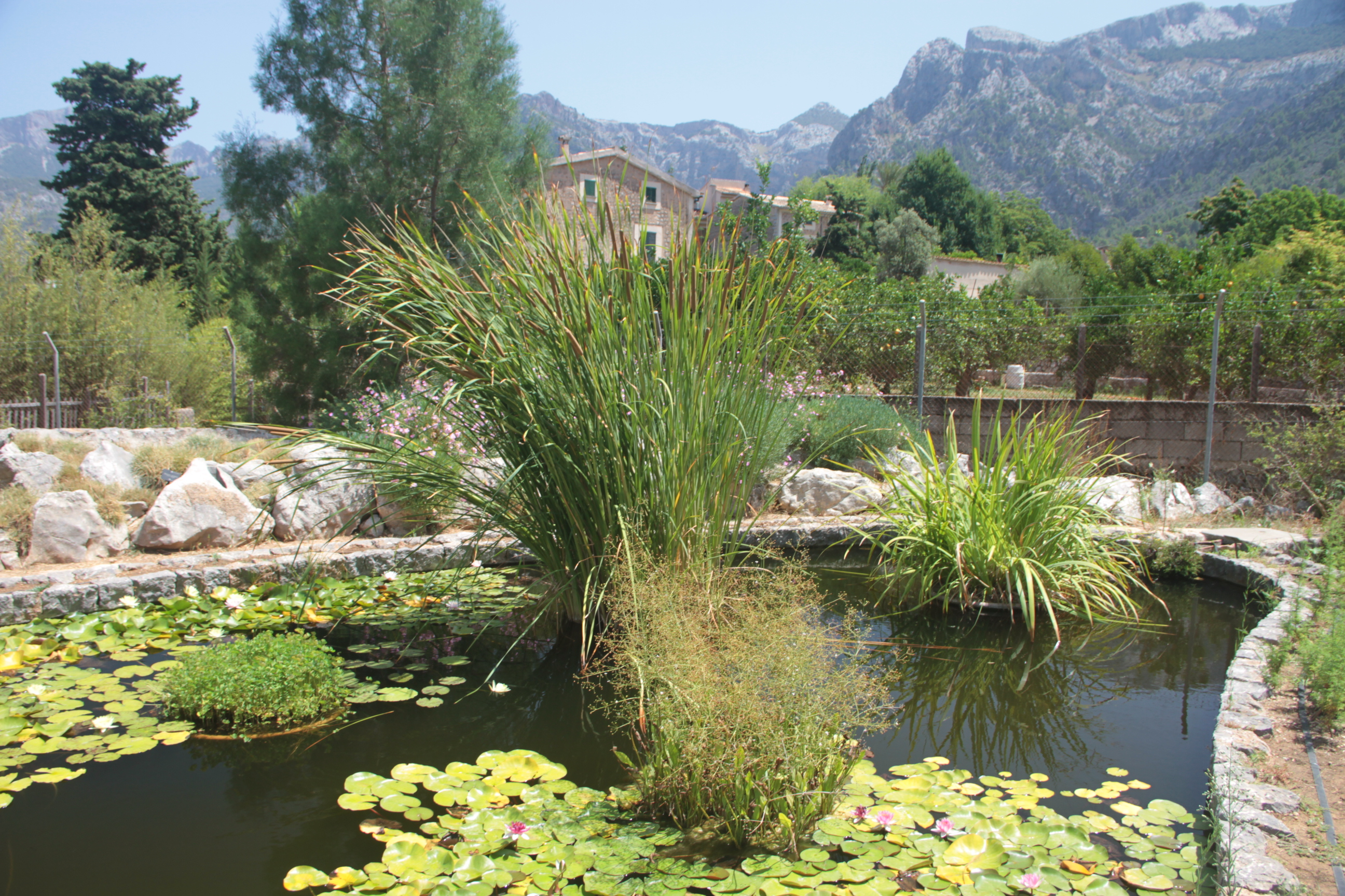 Сольєрський ботанічний сад